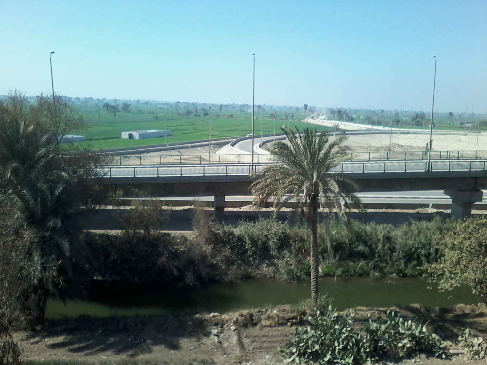 صورة لمركز الواسطى تظهر الجانب الزراعي من المركز وكوبري الواسطى الذي يربط بين غرب النيل وشرقه